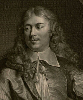 Louis Leramberg, Ausschnitt aus einem Stich